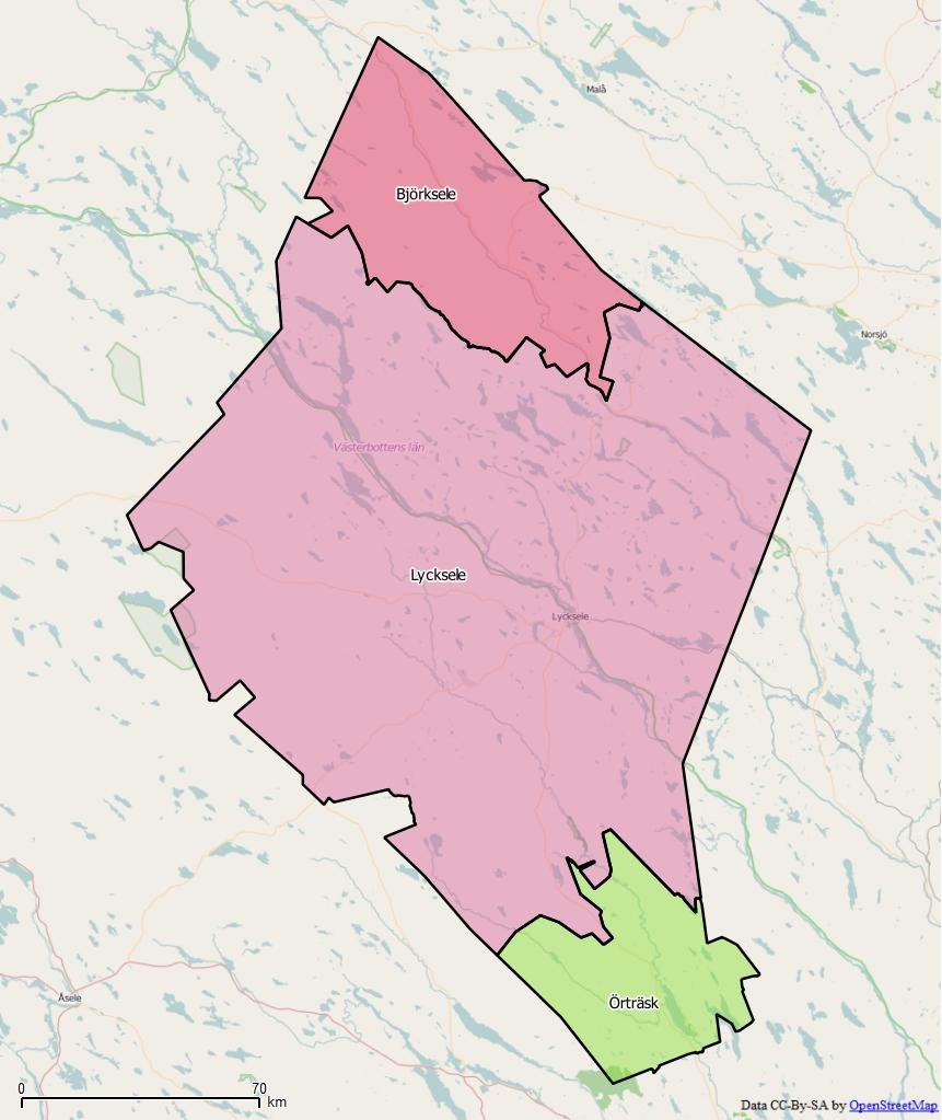 Distriktsindelningen i Lycksele kommun World file: 321.69494729526962828 0 0 -321.69494729526962828 1911451.04594398103654385 9683428.16769349575042725